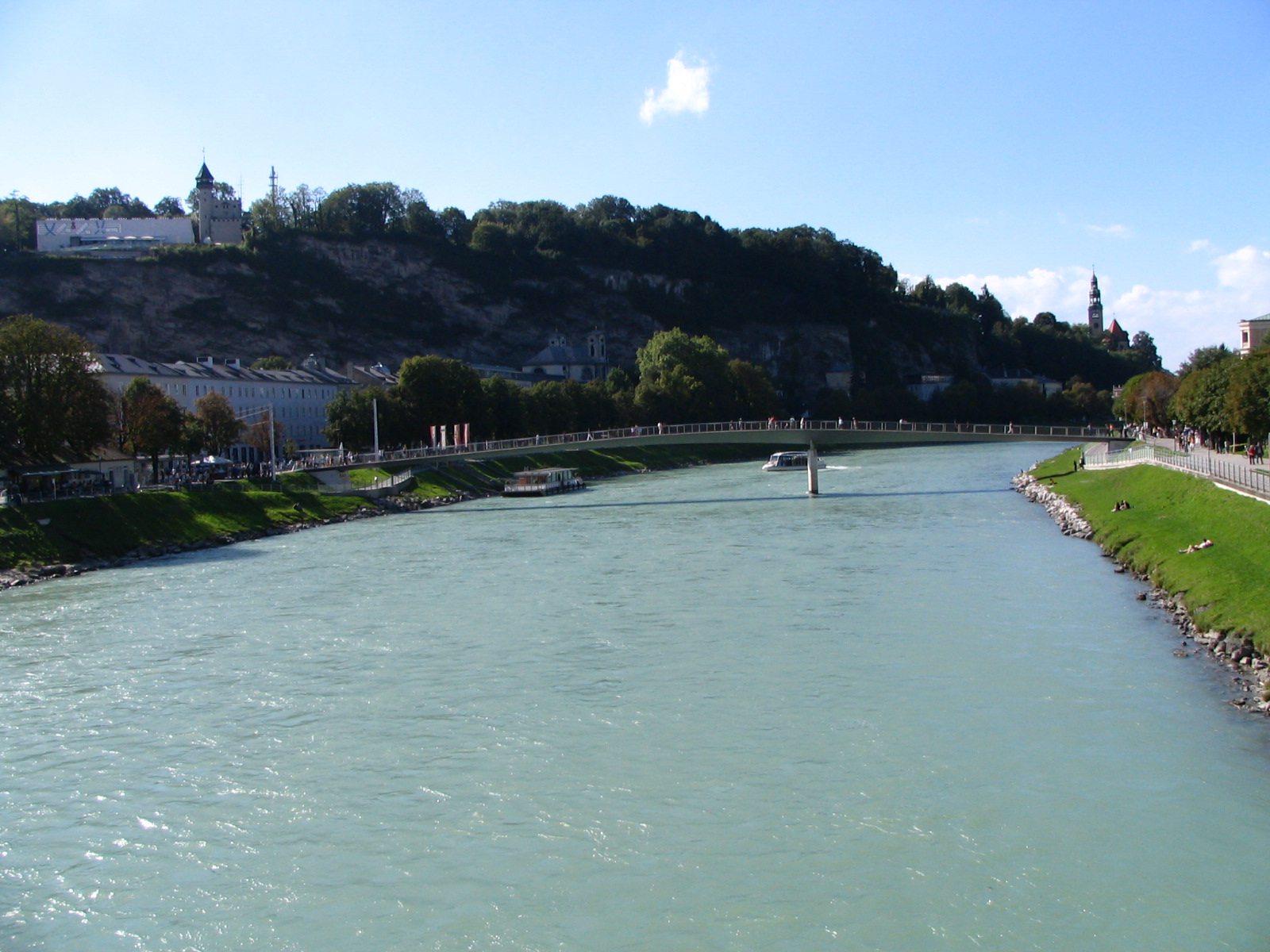 Die Salzach in Salzburg